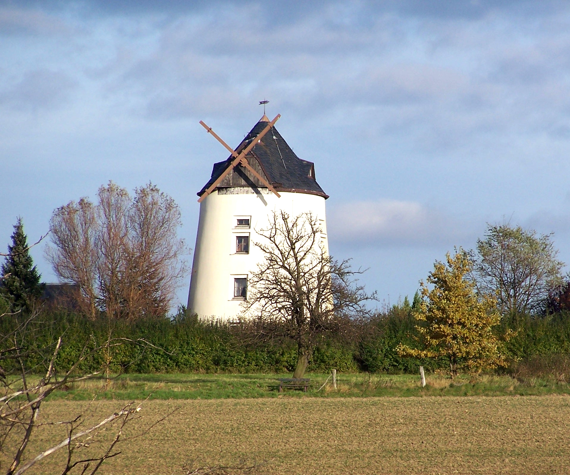 Reitzendorfer Windmühle, nahe Ortslage Zaschendorf, Ortsteil von Dresden